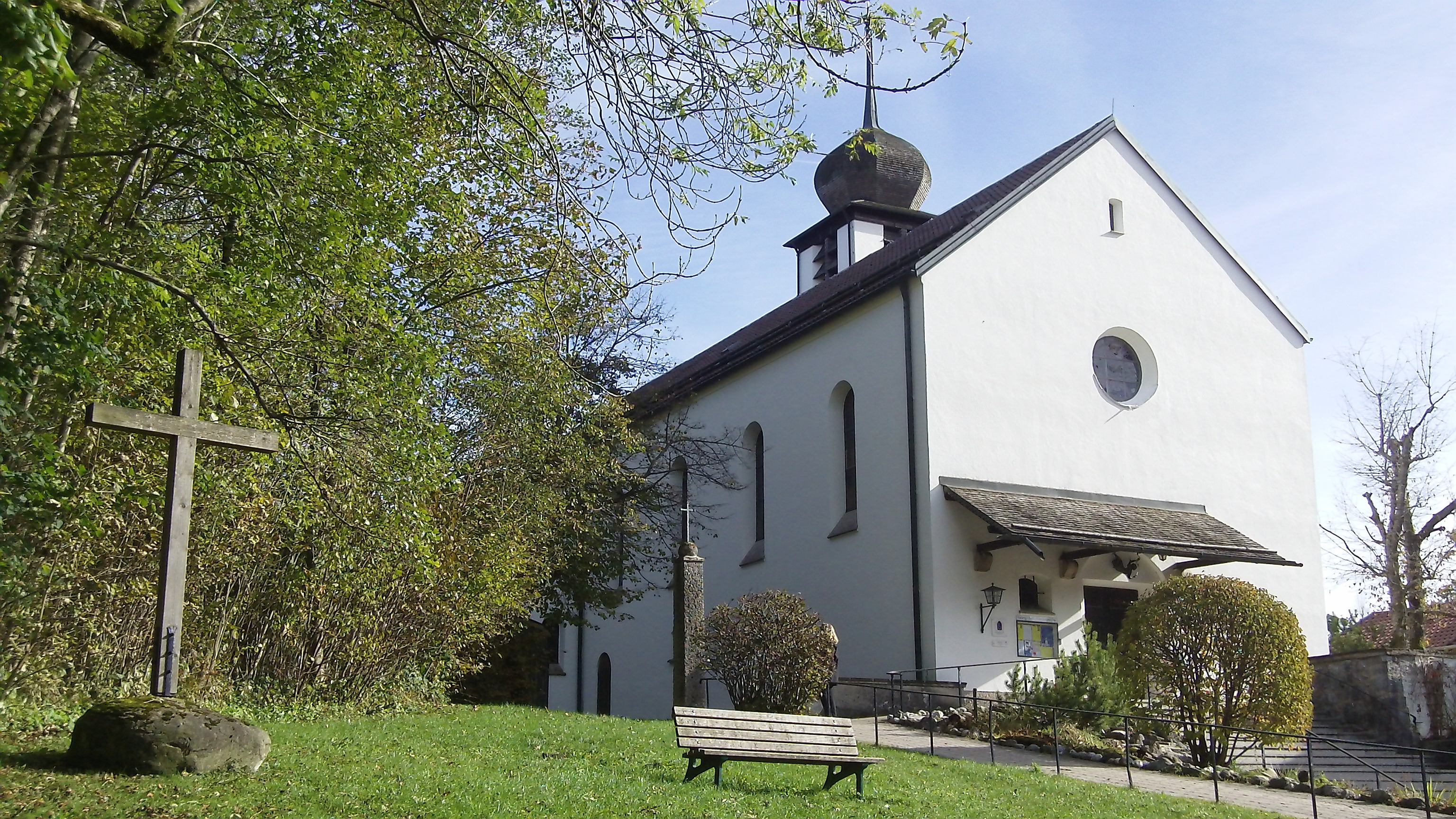 Evangelisch-Lutherische Friedenskirche in Bad Wiessee This is a photograph of an architectural monument.